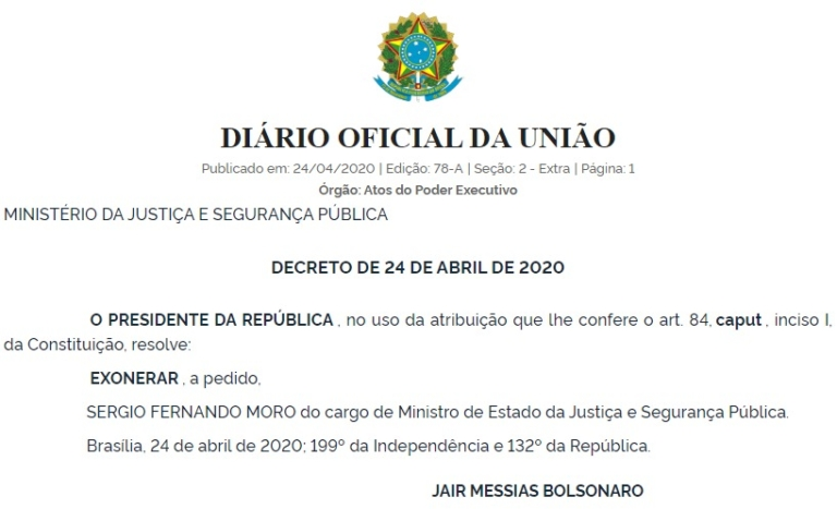 Decreto presidencial de exoneração de Sérgio Moro do cargo de Ministro de Estado da Justiça e Segurança Pública.